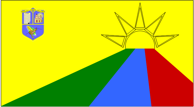 Bandera de Zaraza